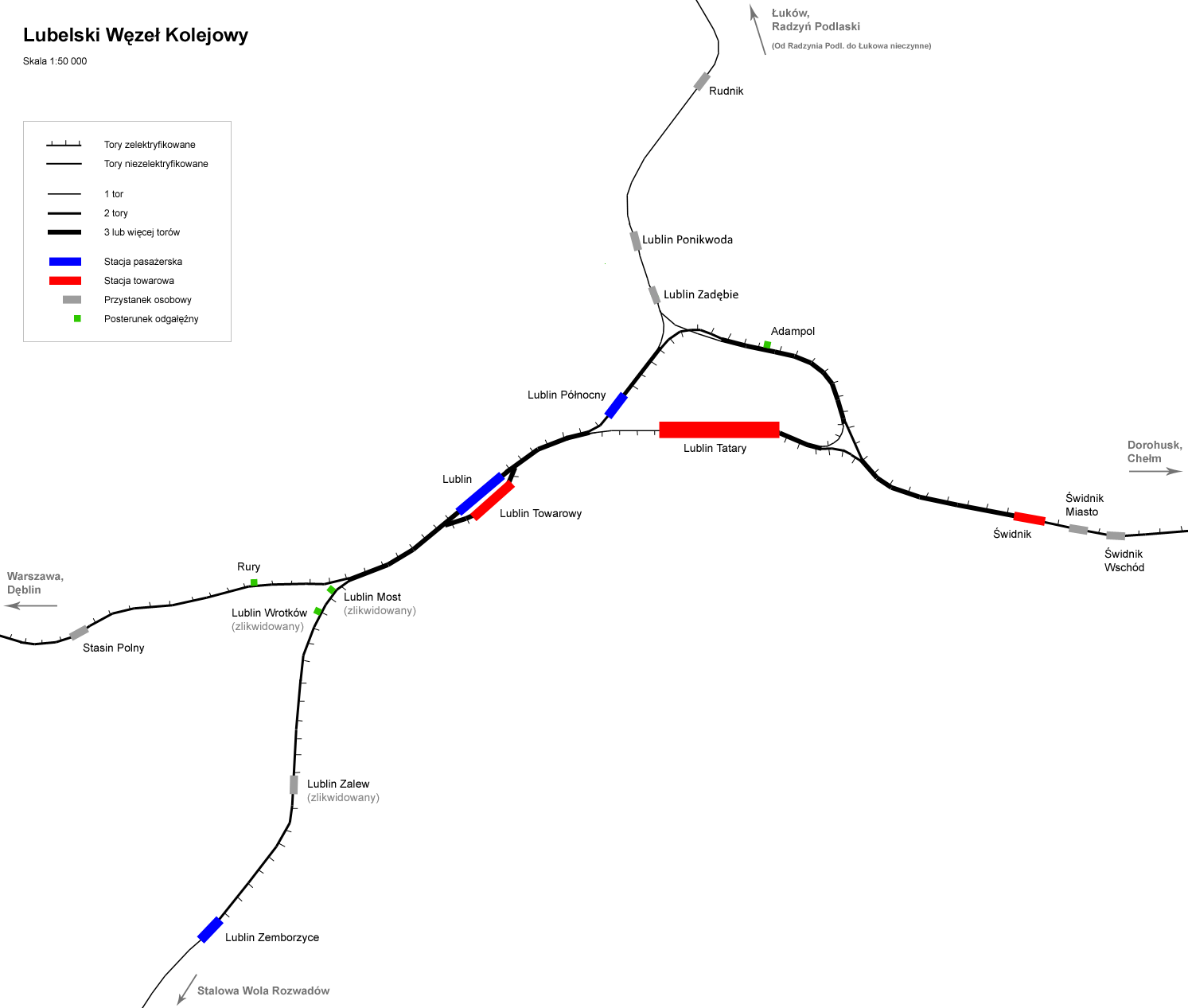 Schemat Lubelskiego Węzła Kolejowego